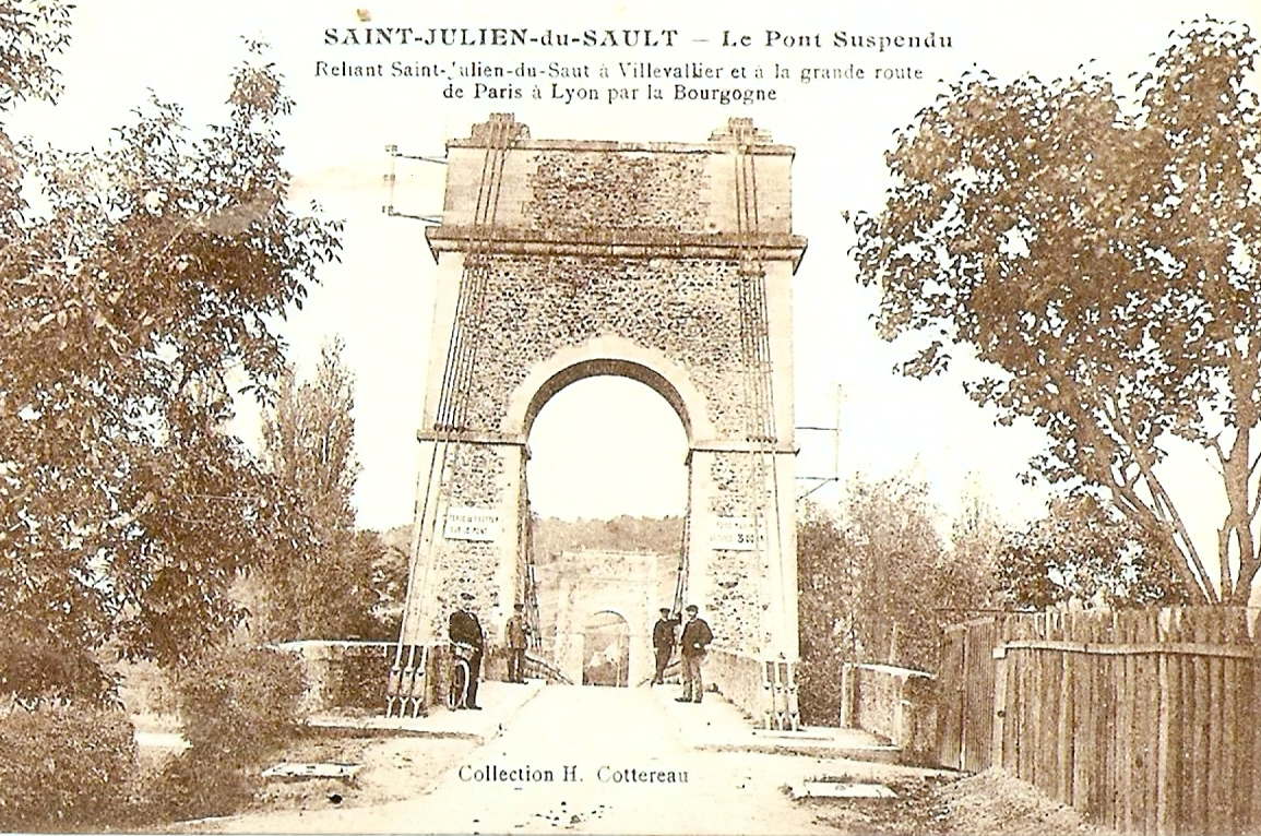 L'entrée du pont suspendu coté Saint-julien du Sault